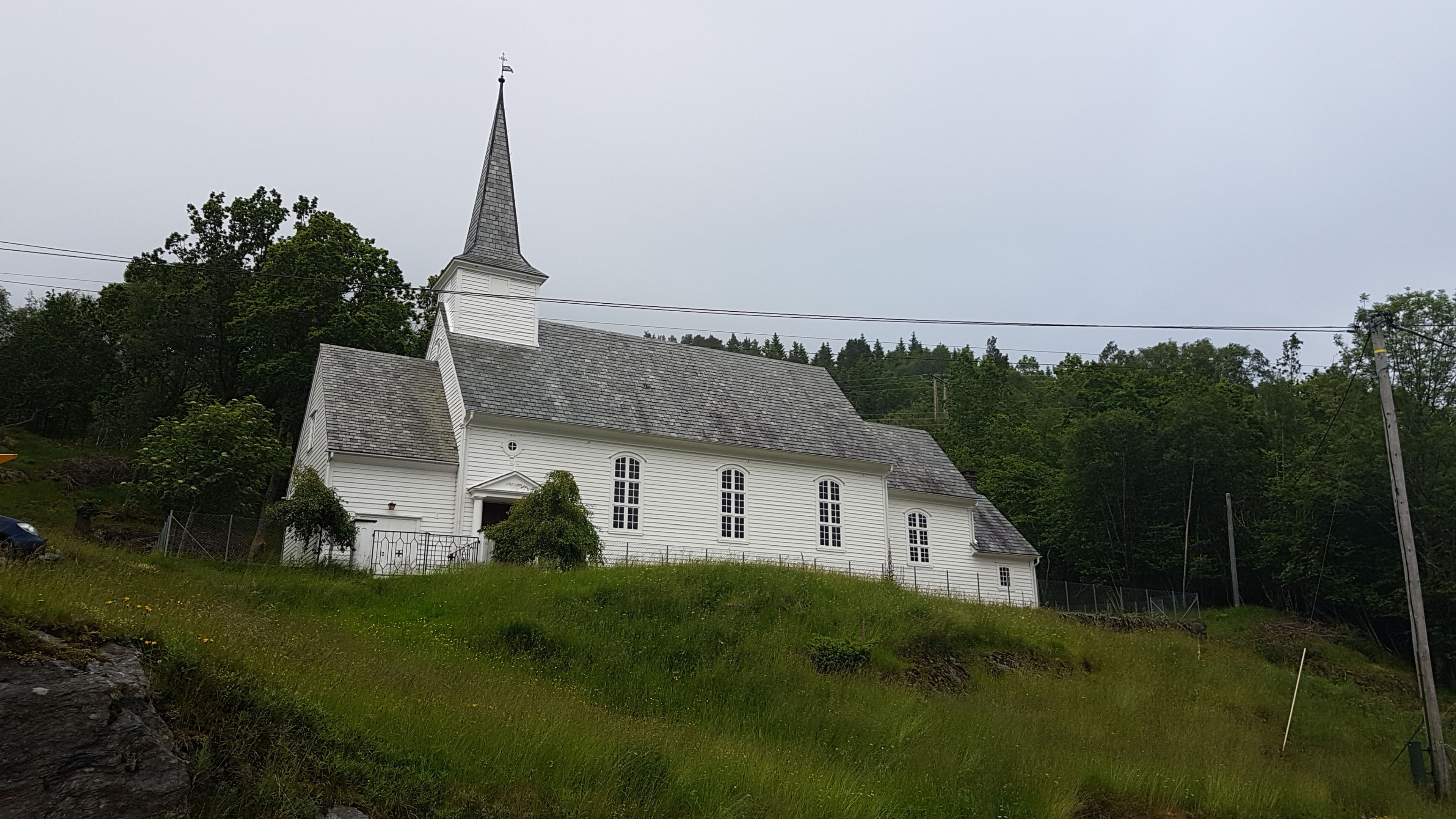 Sundvor kirke, Fusa kommune. Foto: Roger Grimelid. Fra RIksantikvarens Kulturminnesøk.